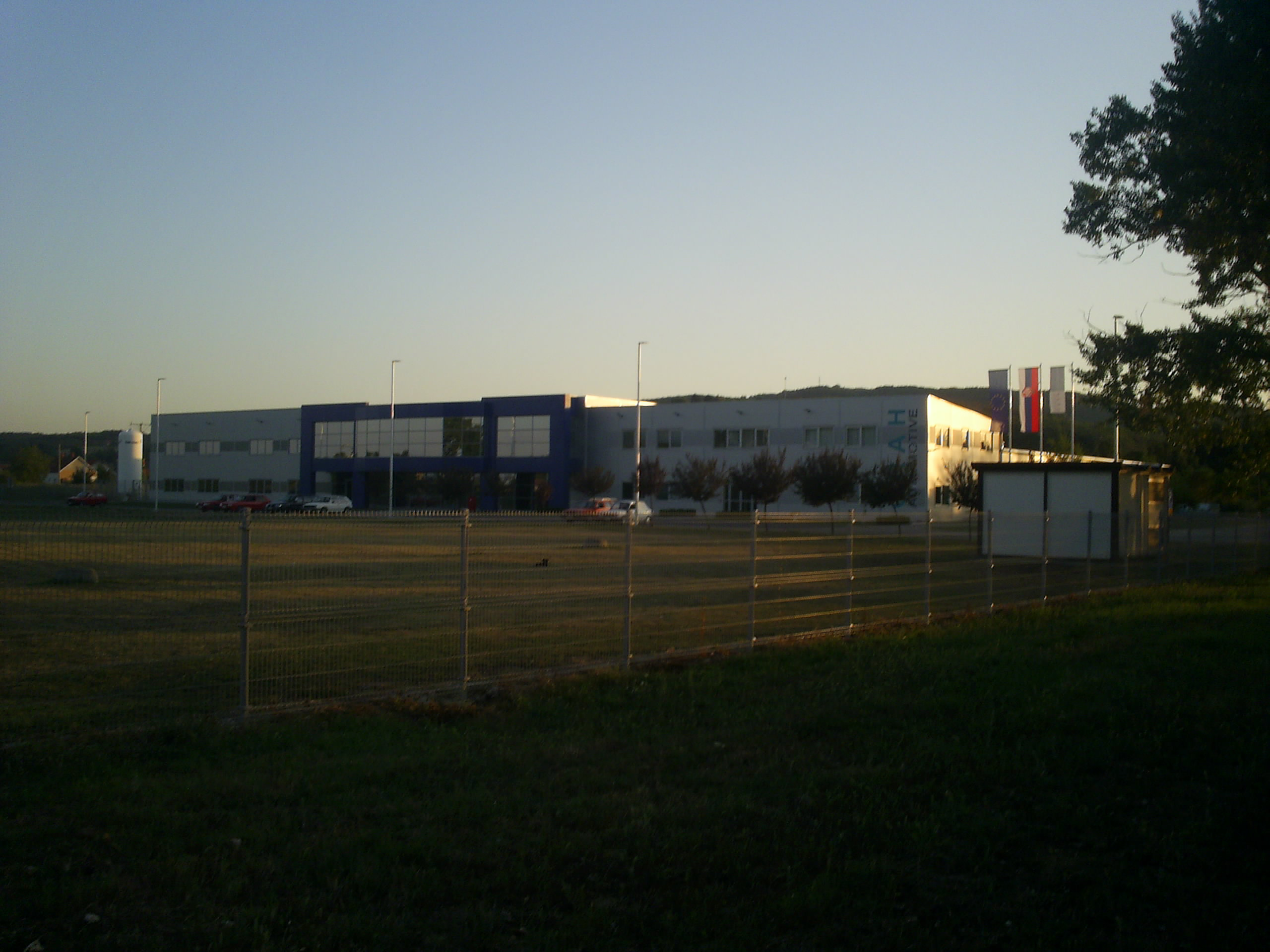 Fabrika Grah automotive u Batočini.